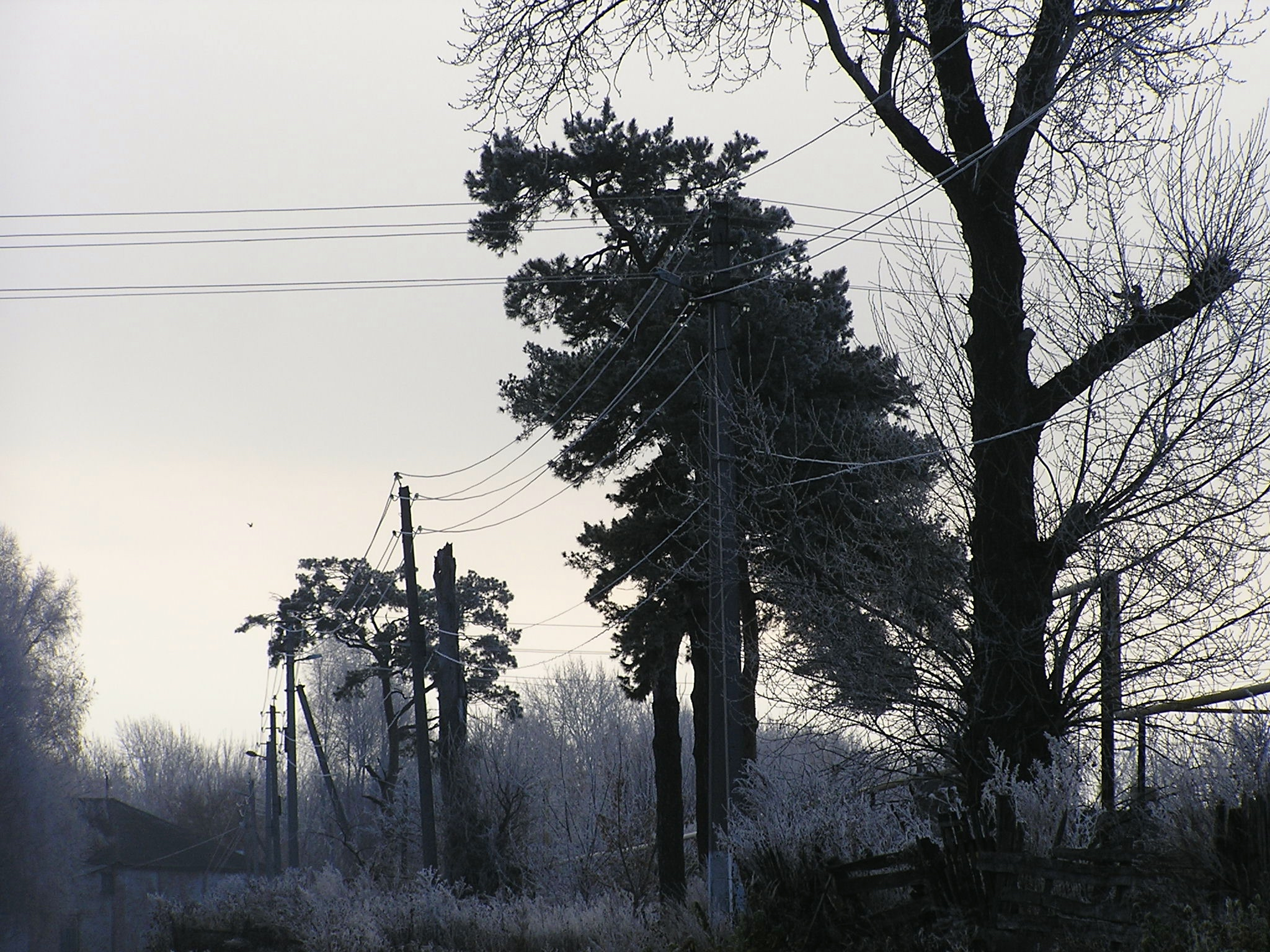 Старые сосны в Кривоозерках